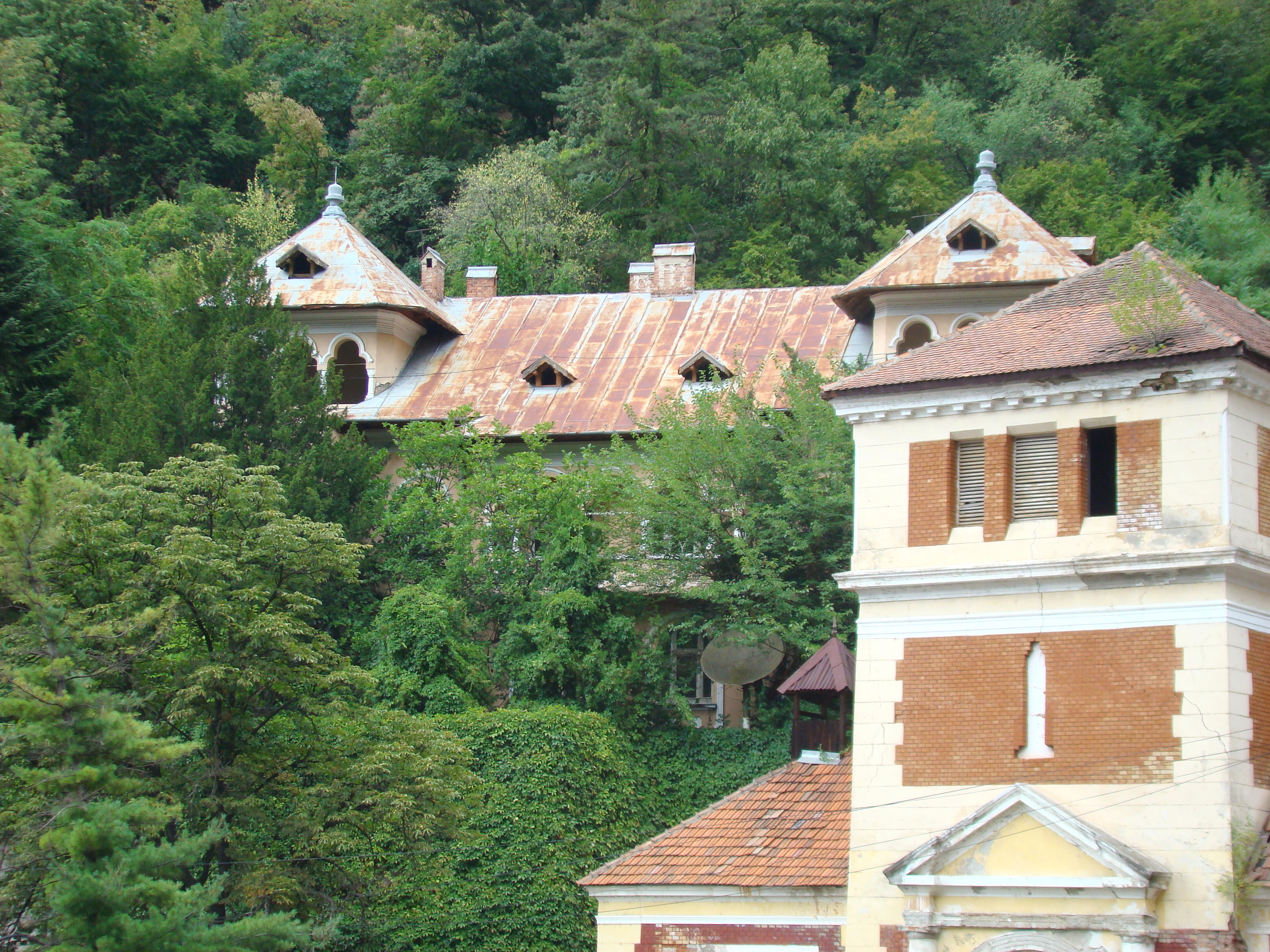 Vila „Crăciunescu” ("Belvedere"), oraș Băile Herculane, Str. Stoica de Hațeg Nicolae 7